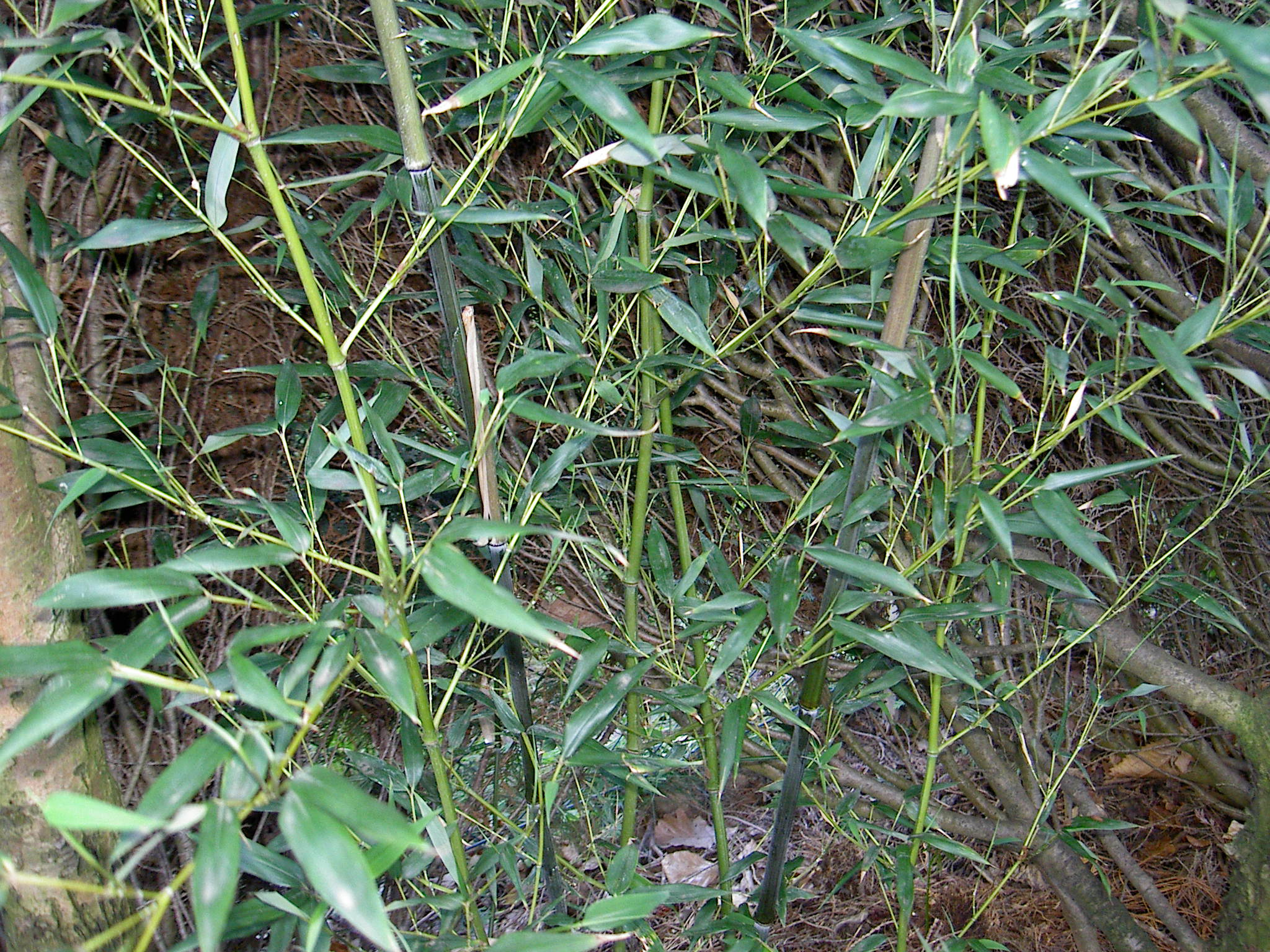 Bambusart Phyllostachis Bissetii